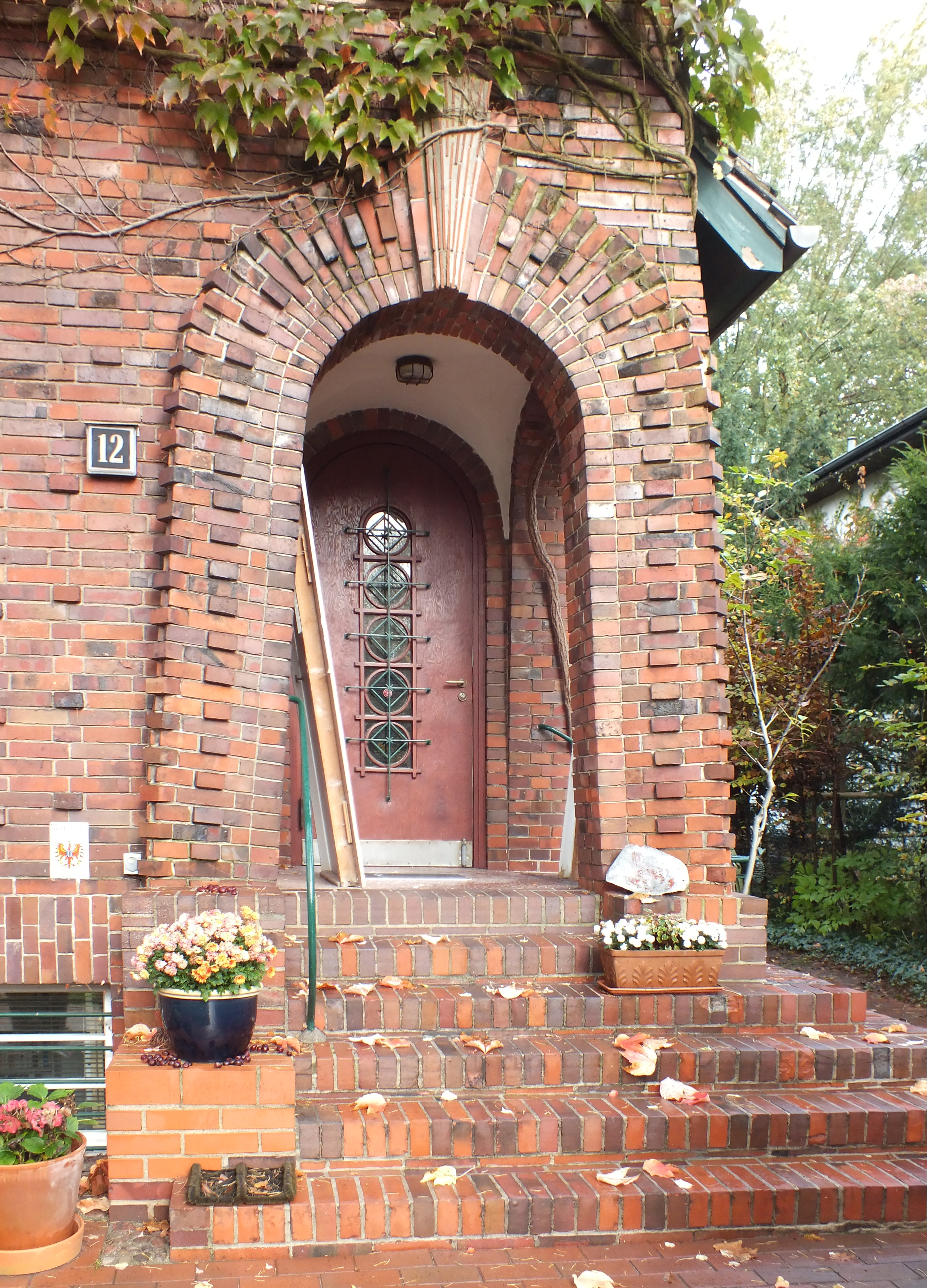 Baudenkmal in Frohnau, Benediktinerstr. 12